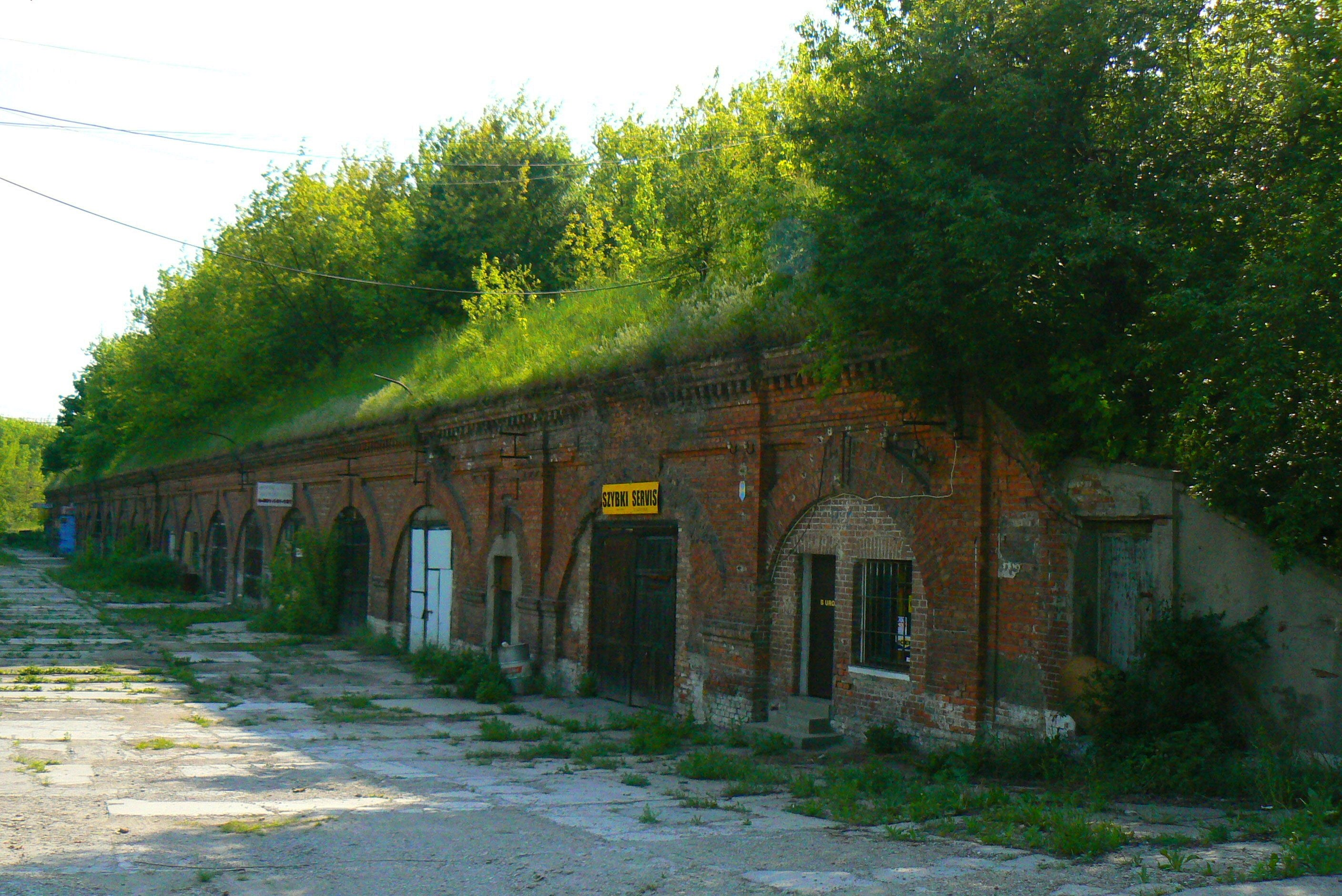 Fort III Twierdzy Warszawa ("Blizne"). Stan w maju 2007.